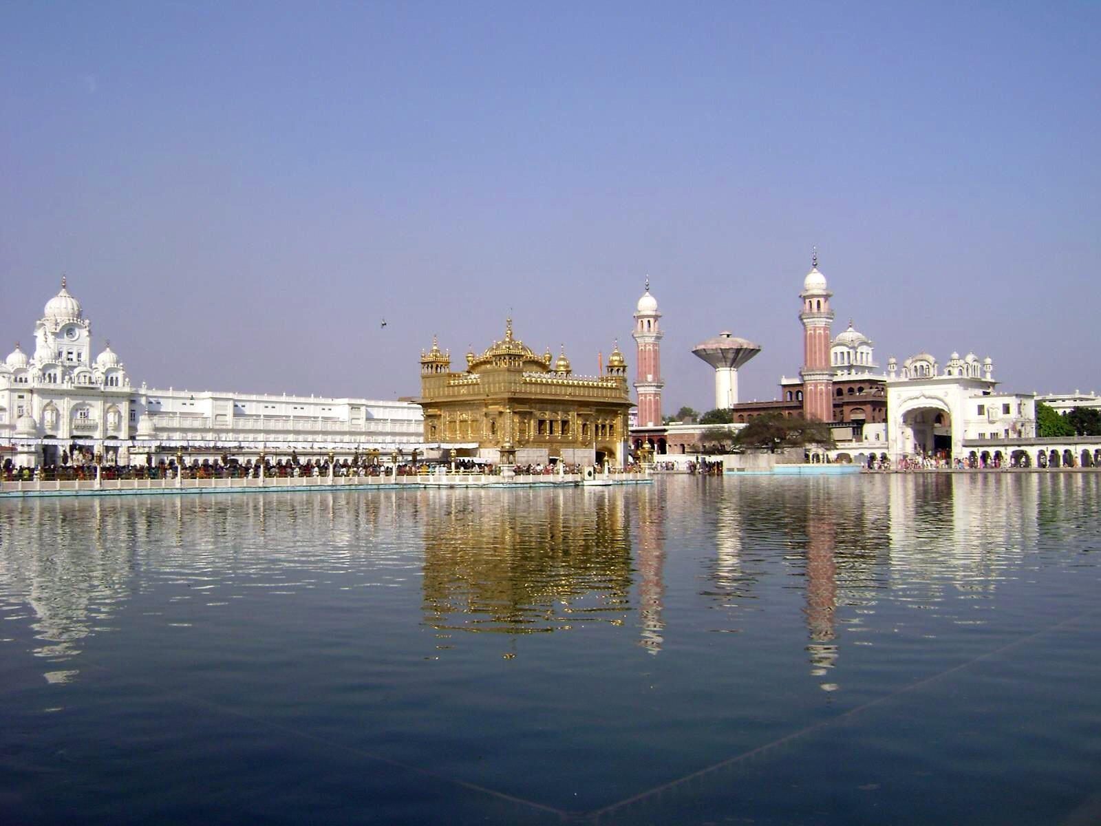 Golden temple (Sri Akal takht sahib) Sri Amritsar sahib